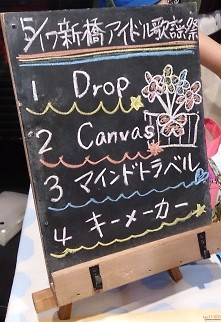 amiinaセトリボード(20150517(2))